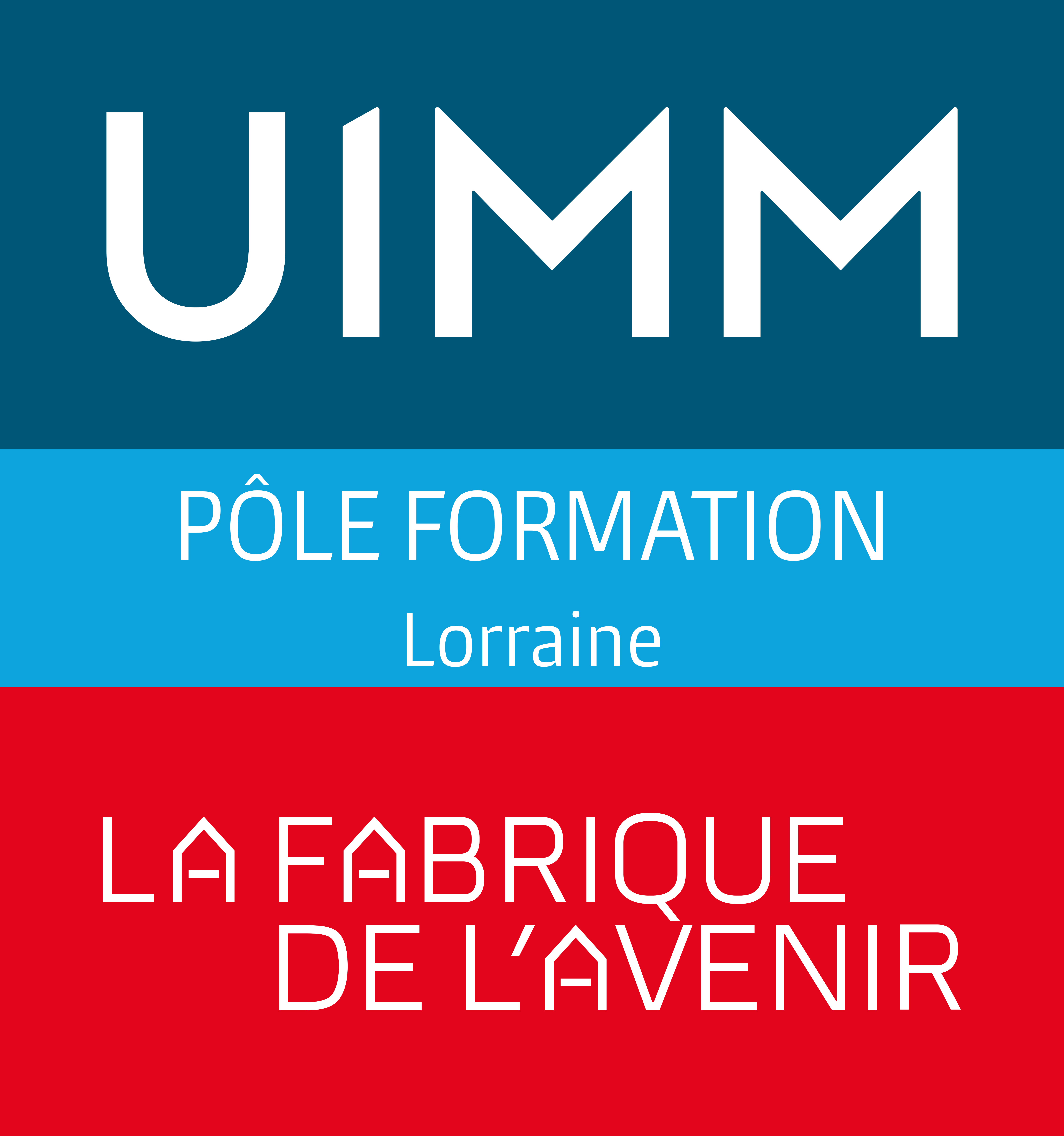 Logo du pôle formation UIMM Lorraine